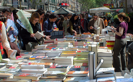 Diada de Sant Jordi a 2007. Parades de venda de llibres a les Rambles